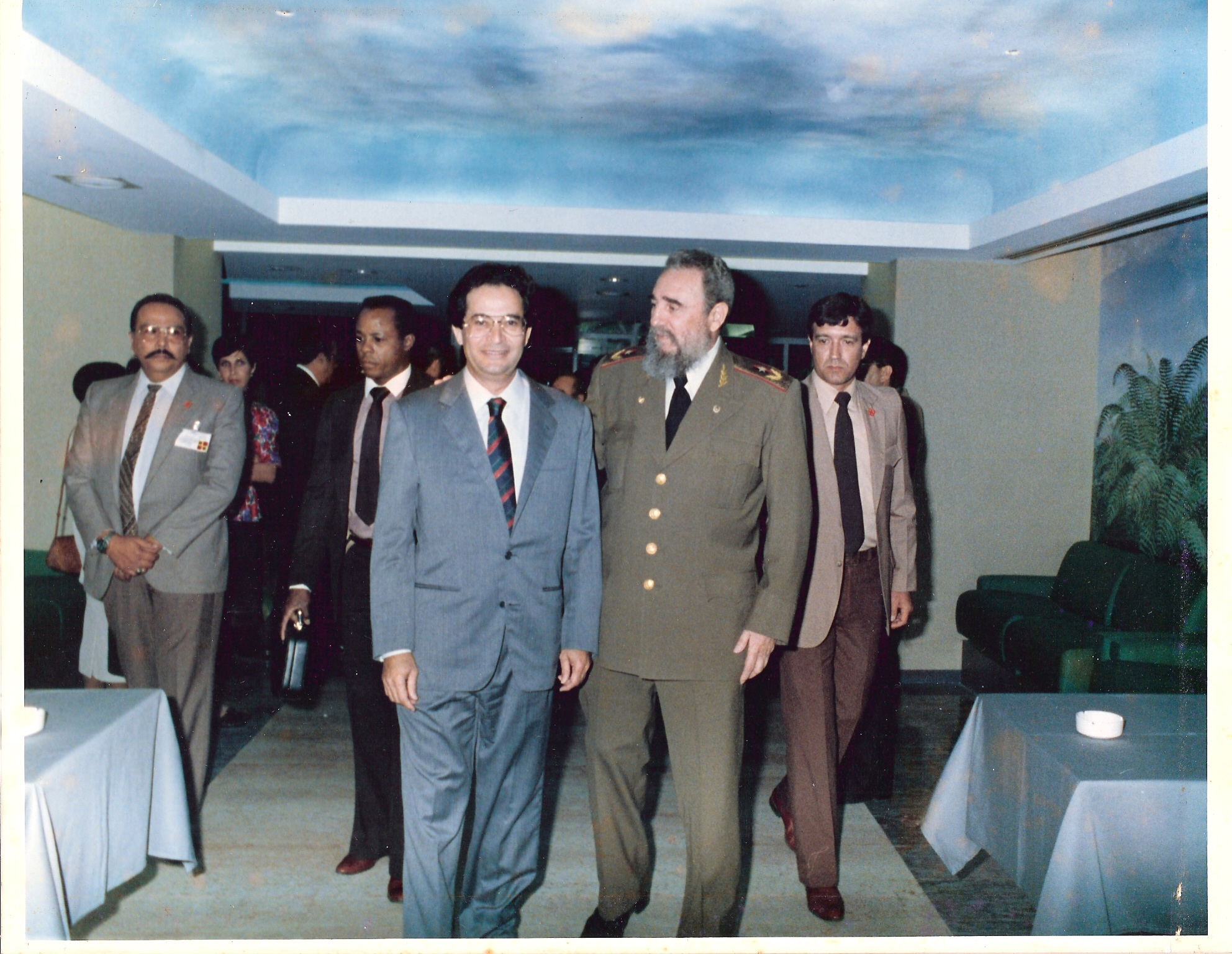 Al Ministro Guerra le correspodió recibir en una ocasión al líder de la Revolución Cubana, Fidel Castro Ruz en Venezuela.